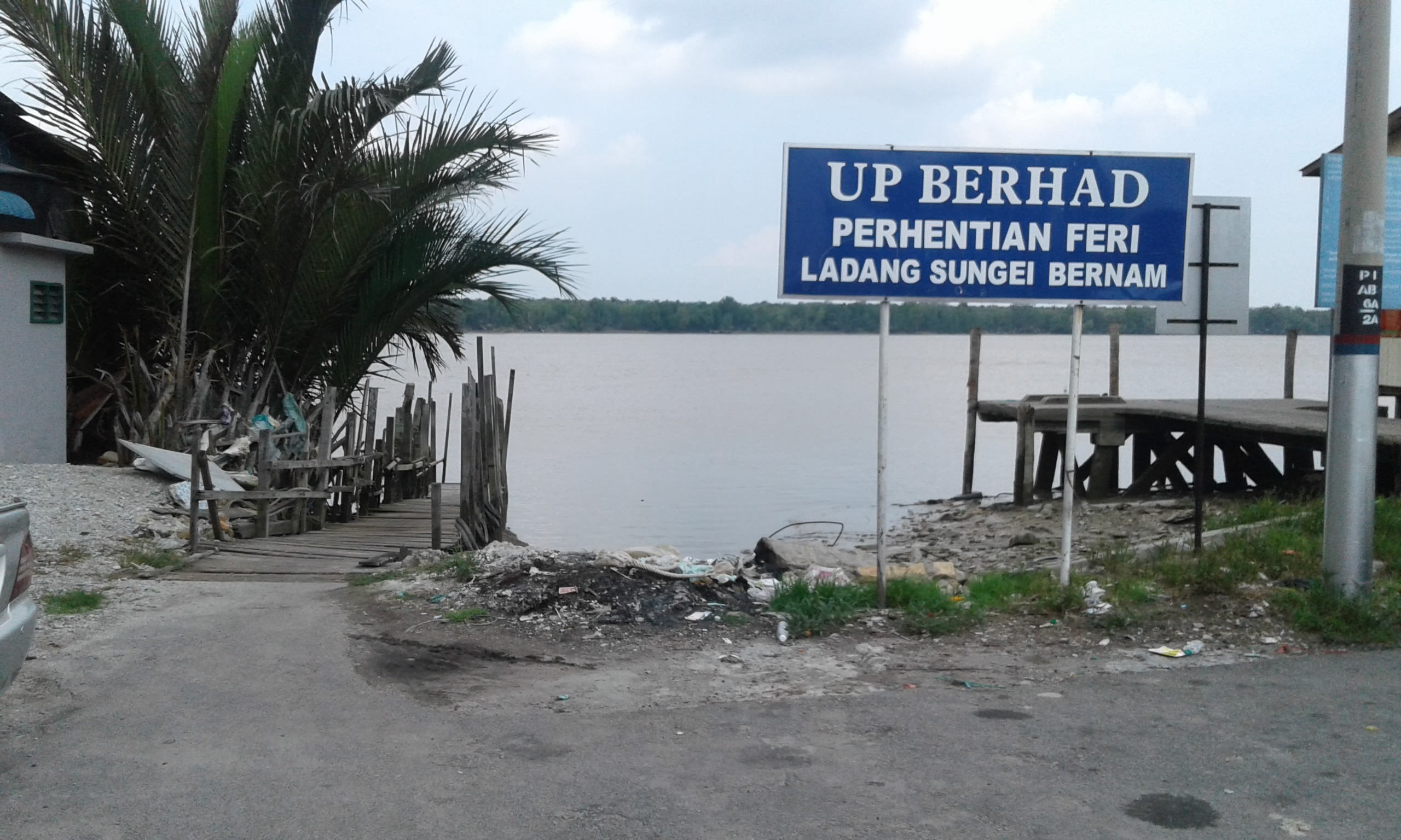 Jeti Bot